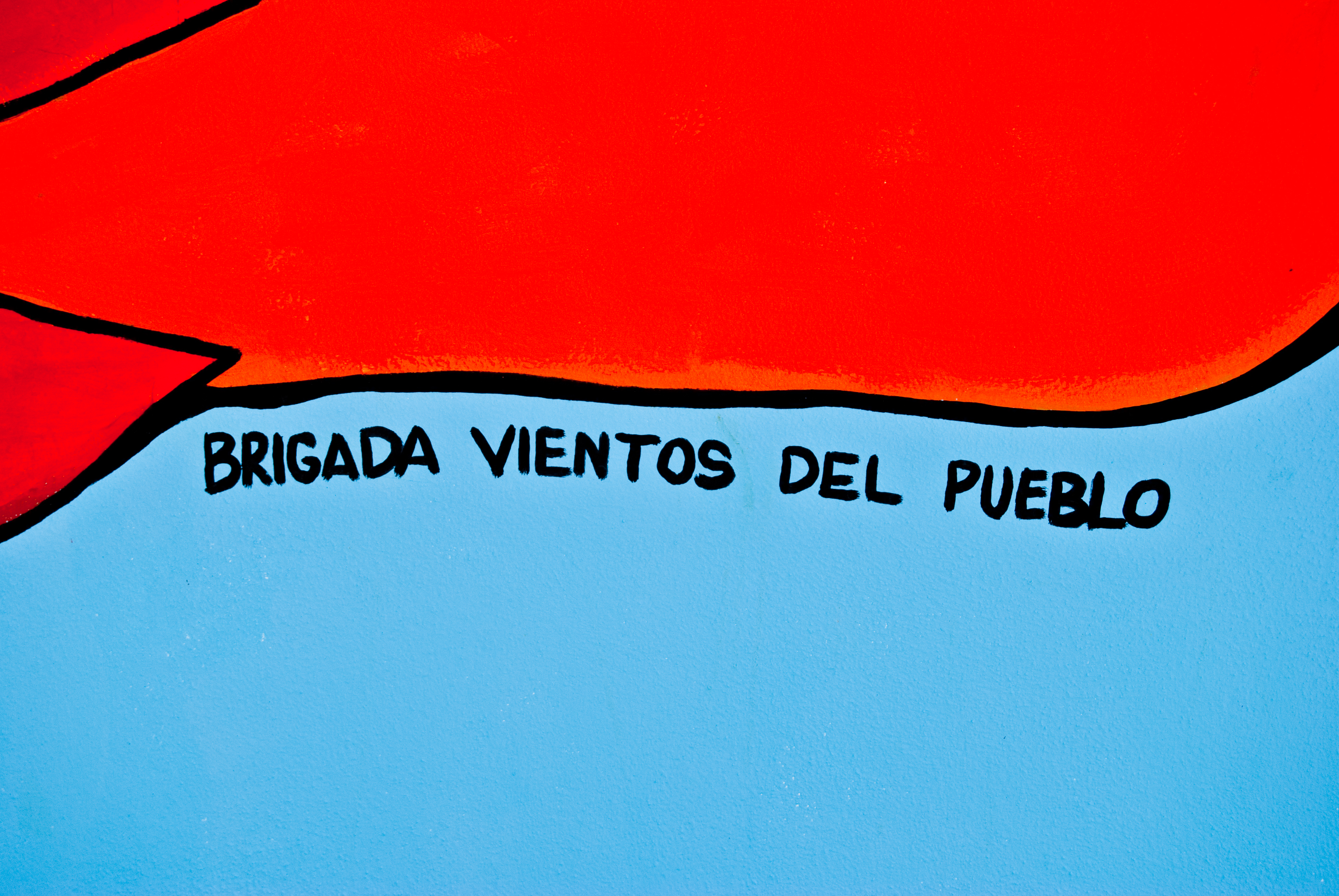 Firma Brigada Vientos del Pueblo